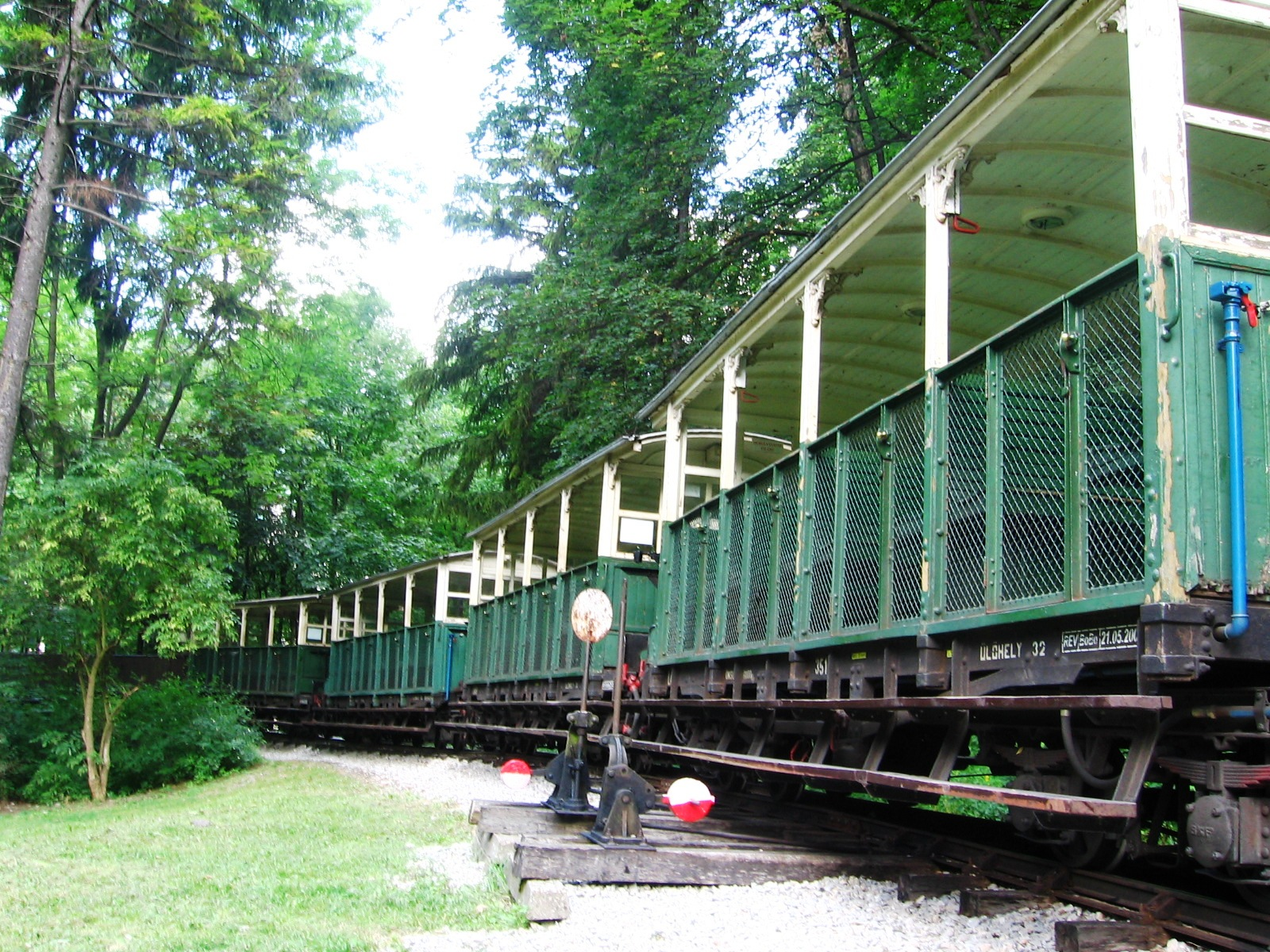 Lillafüredi tárolóvágány Diamond kocsikkal